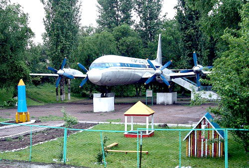 Самолет Ил-18 Дворца детей и юнощества "Умит"